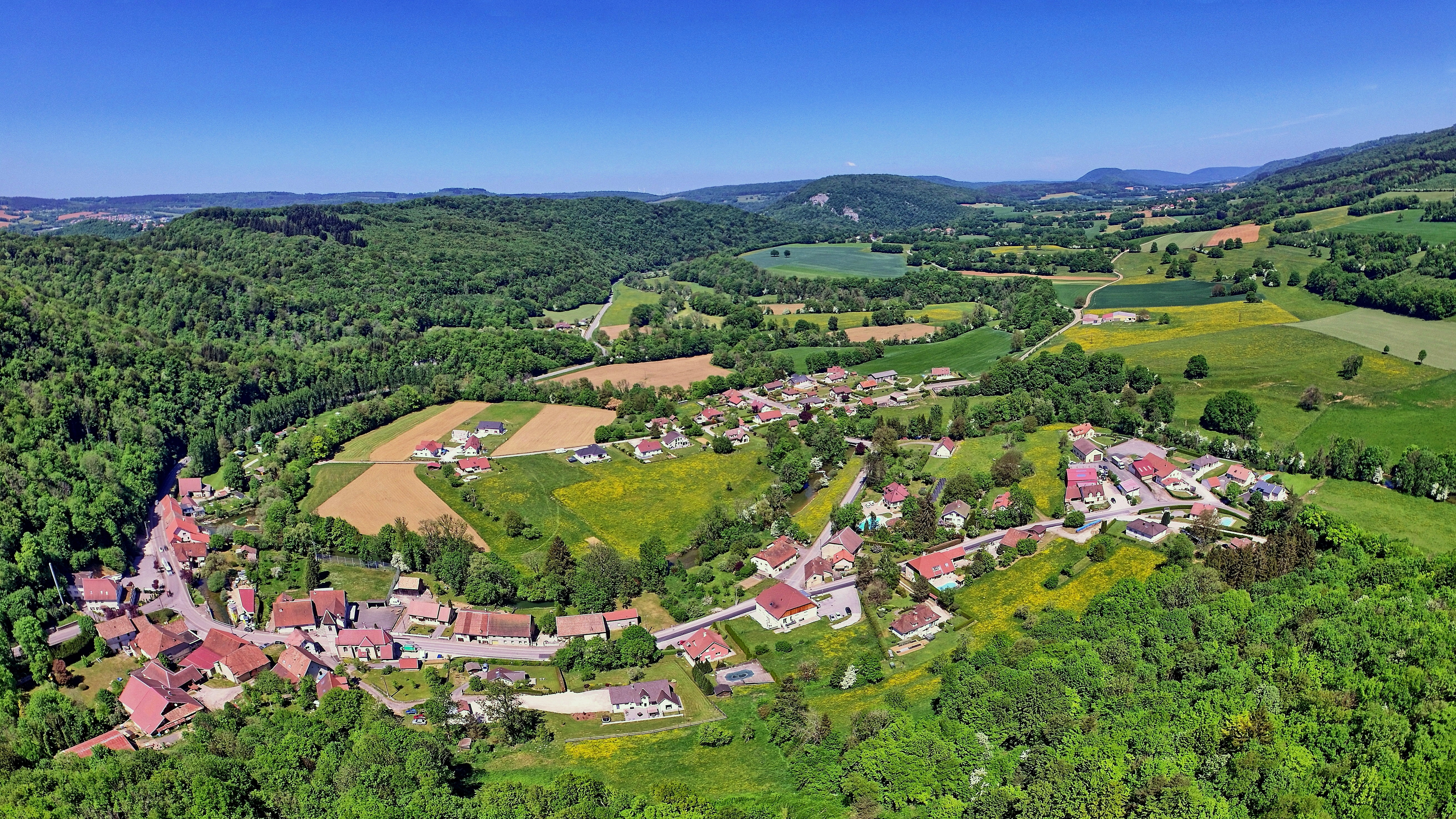 Vue générale du village